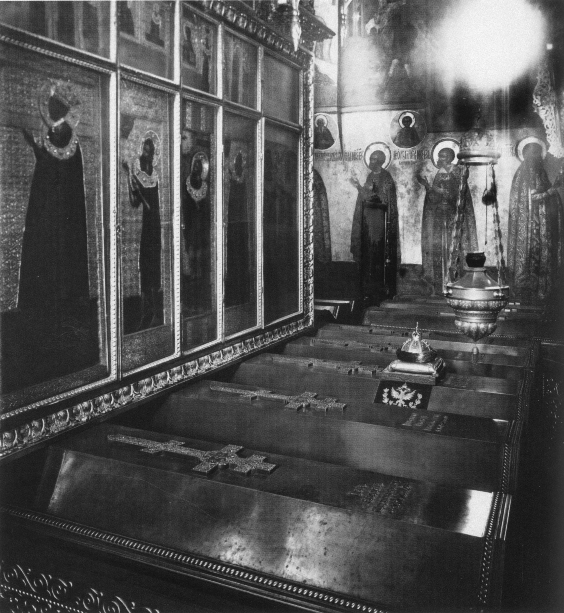 Фото из журнала "Родина".